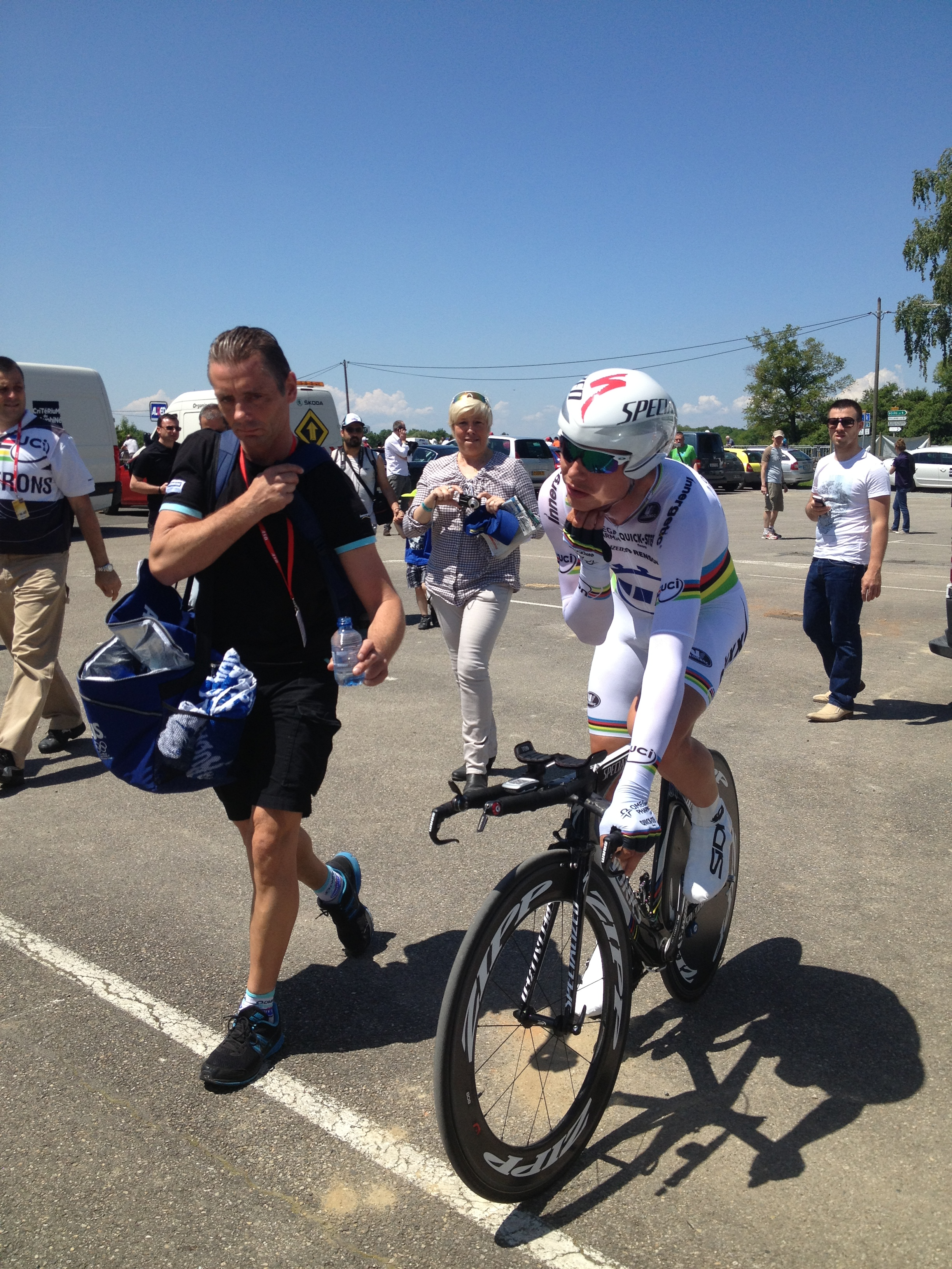 Tony Martin, quelques minutes après son clm victorieux.